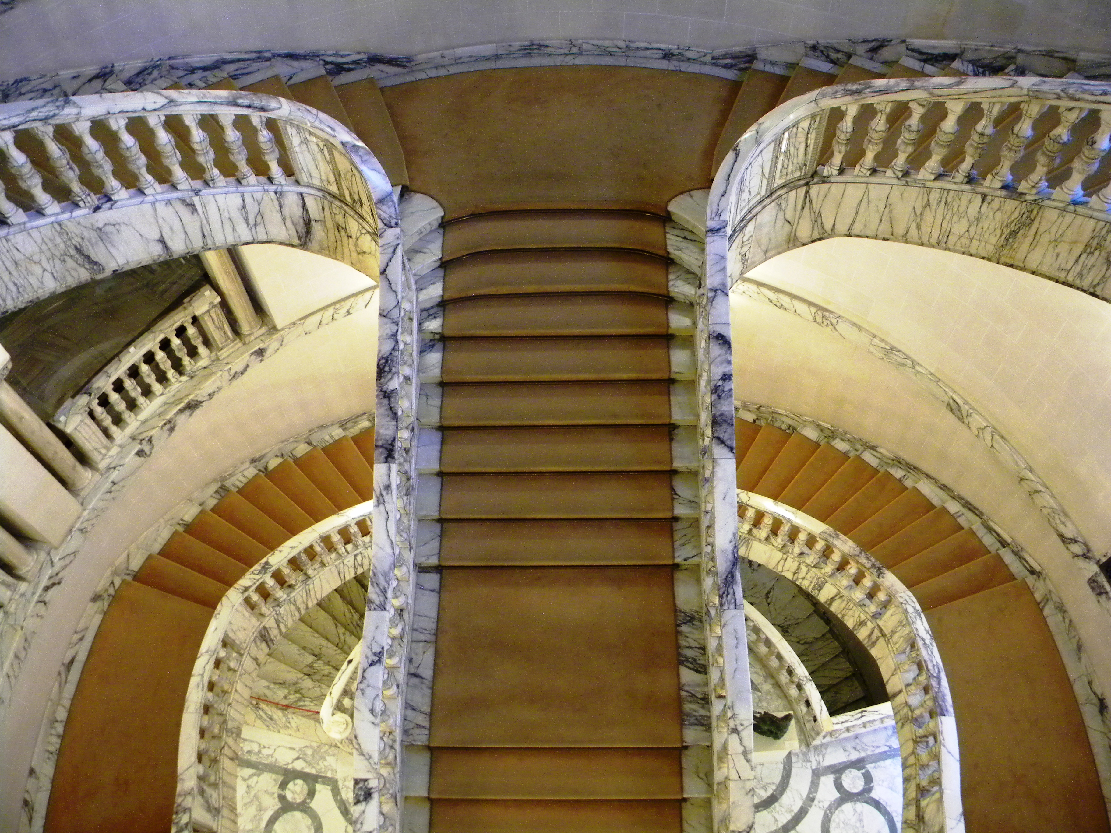 Bucuresti, Romania, Palatul Regal (Muzeul de Arta al Romaniei - Galeria de Arta Europeana - detaliu 20 - Scara Arabescata); B-II-m-A-19856